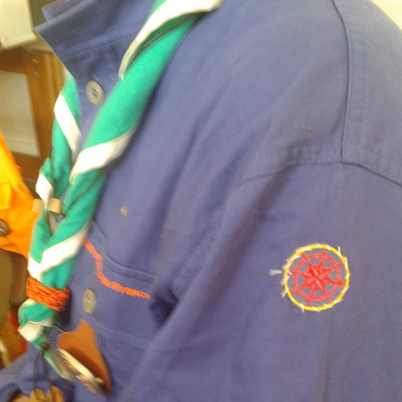 Le brevet du Scoutisme français de Patron d'embarcation, porté par un responsable des Scouts et Guides de France